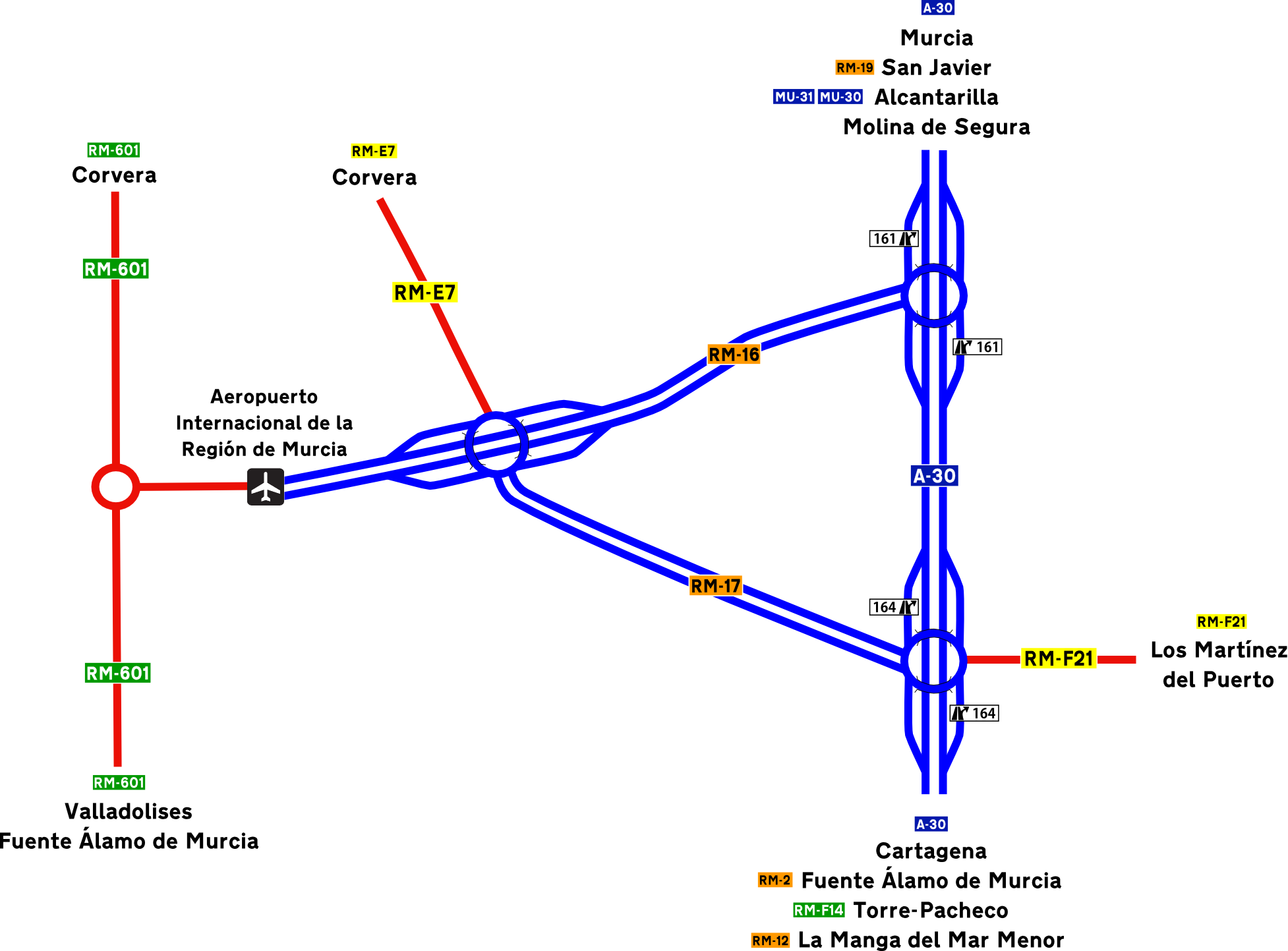 Mapa esquemático de los accesos al Aeropuerto Internacional de la Región de Murcia